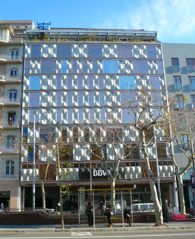 Antiga seu de Banca Catalana al passeig de Gràcia, 84, de Barcelona. Obra de 1968 de l'arquitecte Josep María Fargas